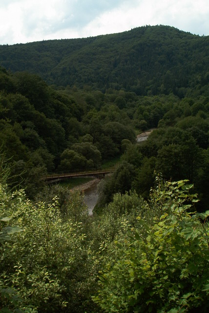 Osława river, near Duszatyn